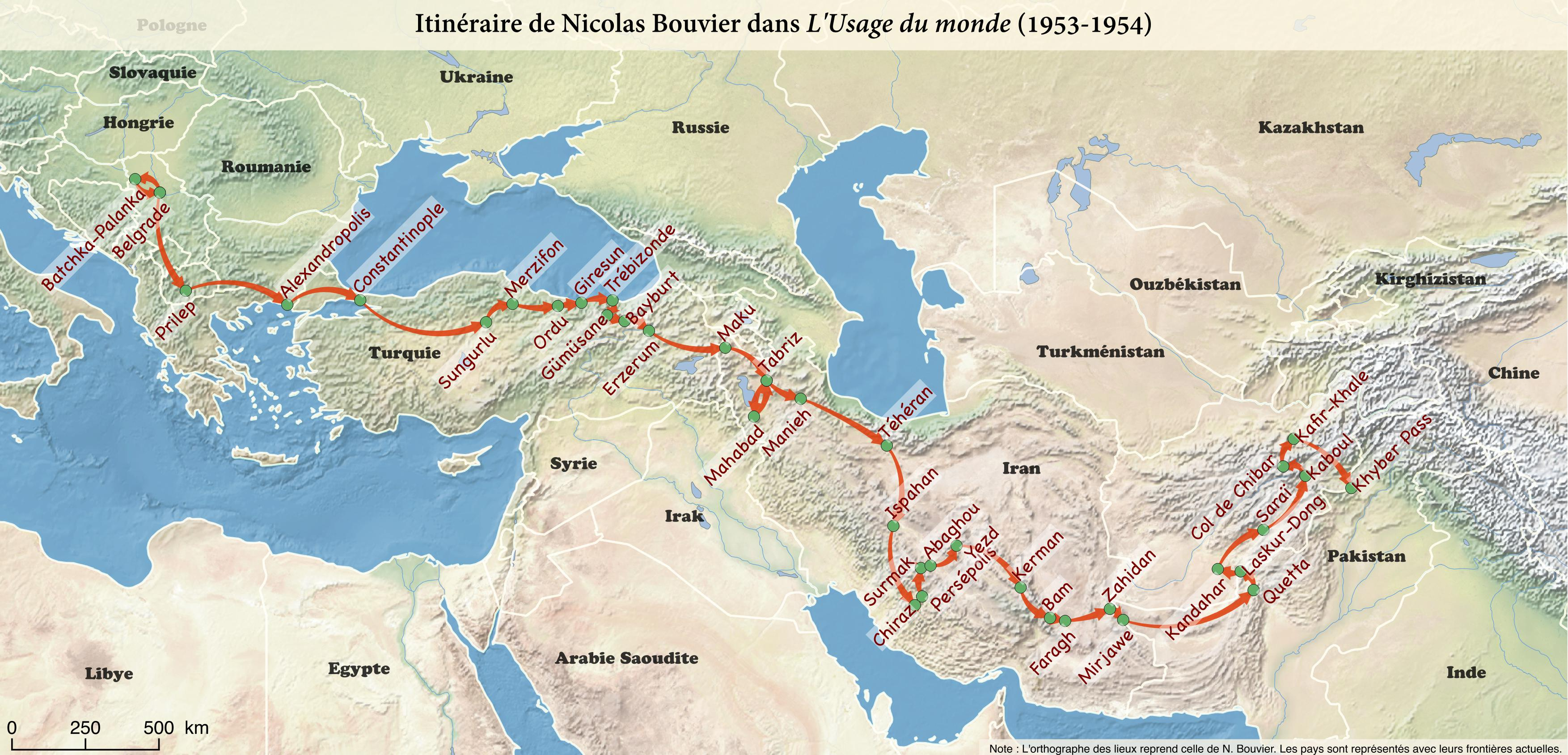 Carte du voyage de Nicolas Bouvier, réalisé en 1953-1954, et raconté dans son récit autobiographique L'Usage du monde (1963). Les noms de lieux reprennent l'orthographe utilisée par l'auteur. Les pays sont présentés avec leurs frontières actuelles.